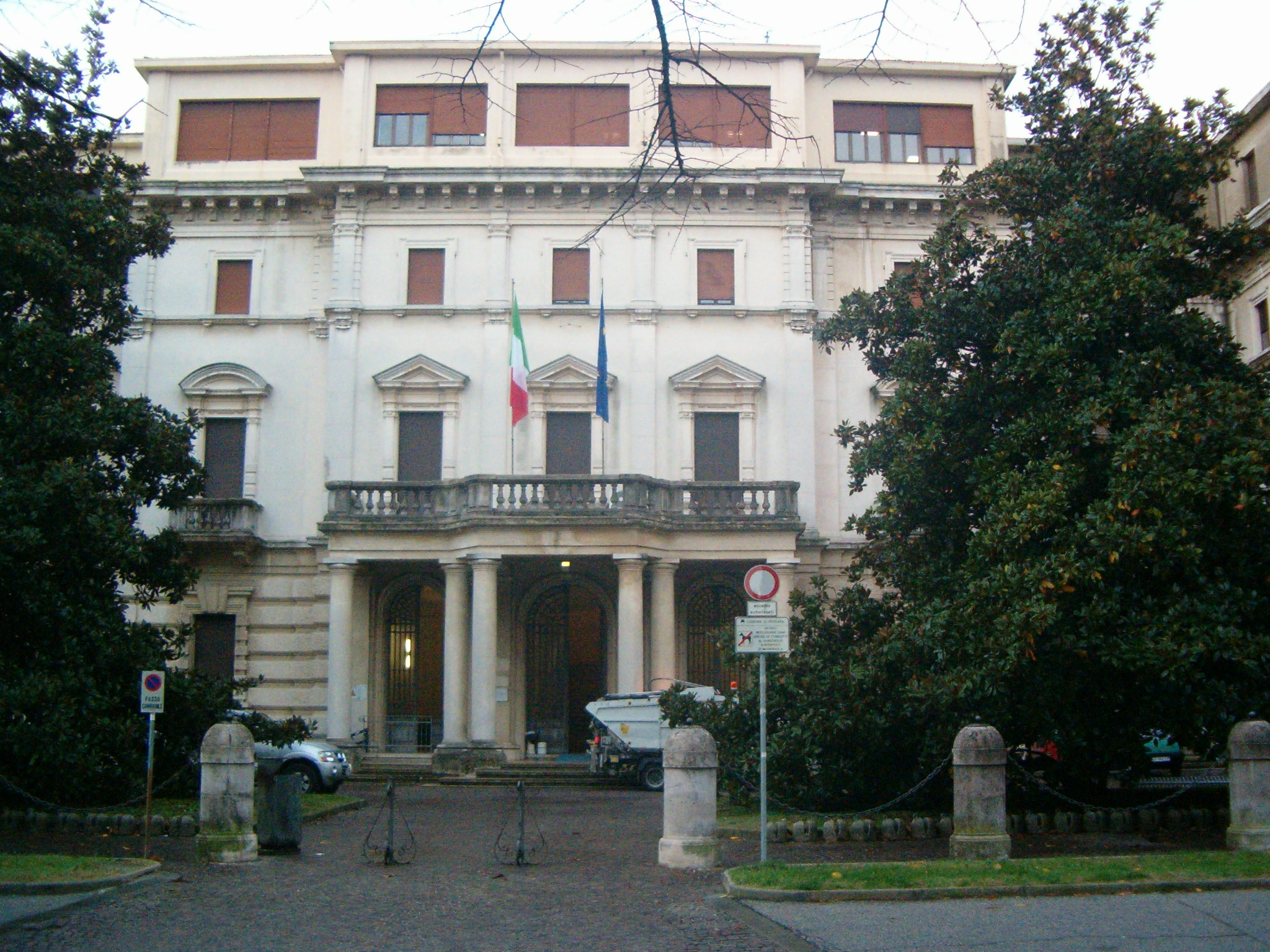 Ex Casa del Fascio - Ferrara - Facciata verso Viale Cavour, novembre 2009